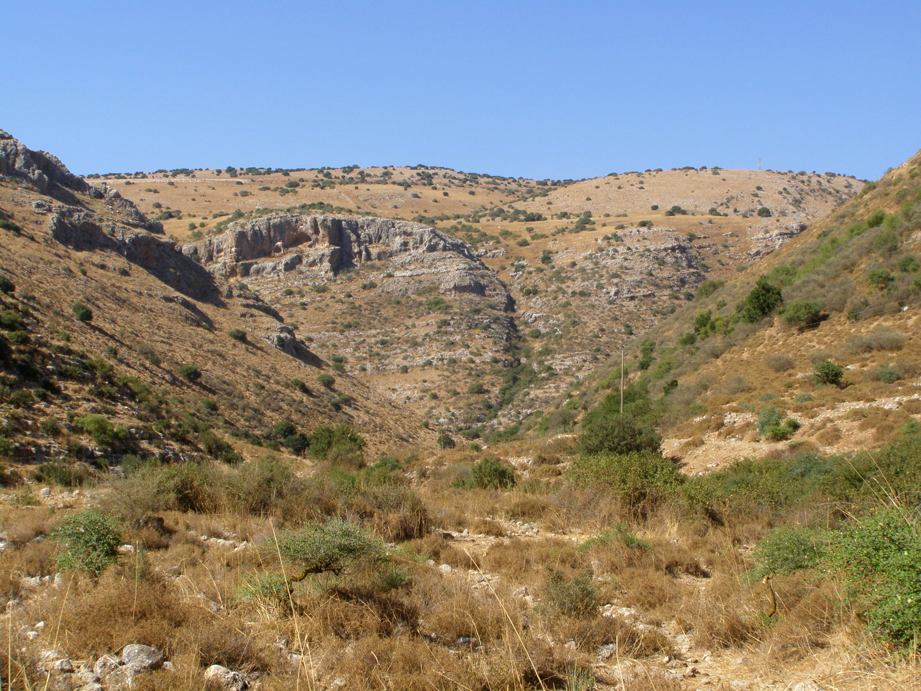 Izrael, Horní Galilea, Nachal Dišon